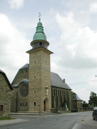 vue de l'église de Maldingen, extérieur